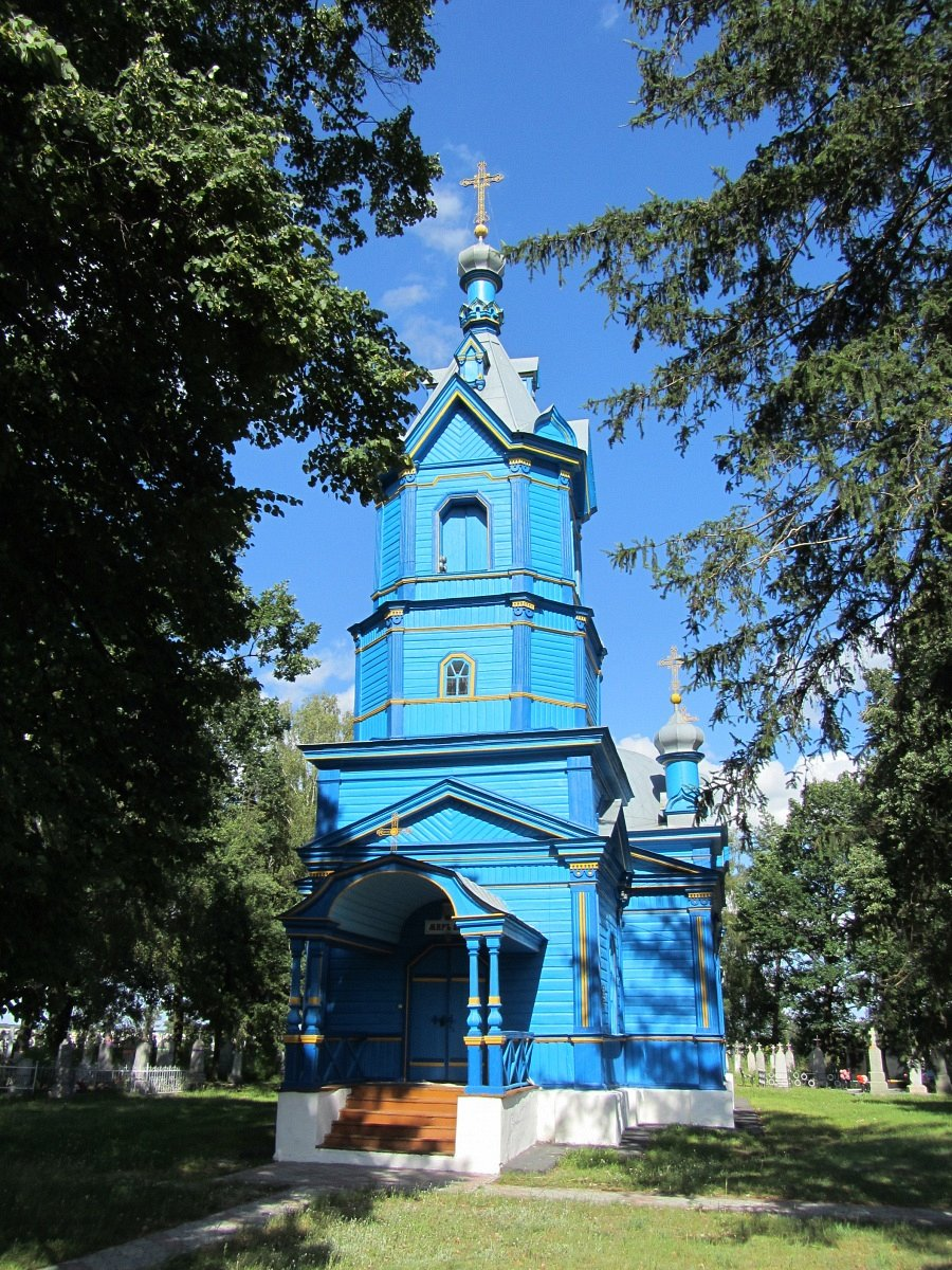 Дубай. Свята-Мікалаеўская царква